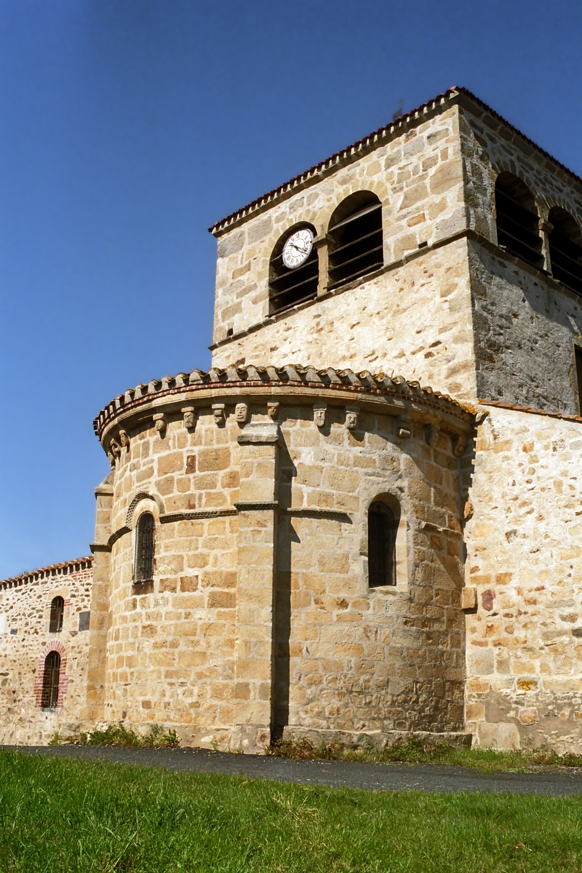 France - Auvergne - Velay - Église de Saint-Hilaire